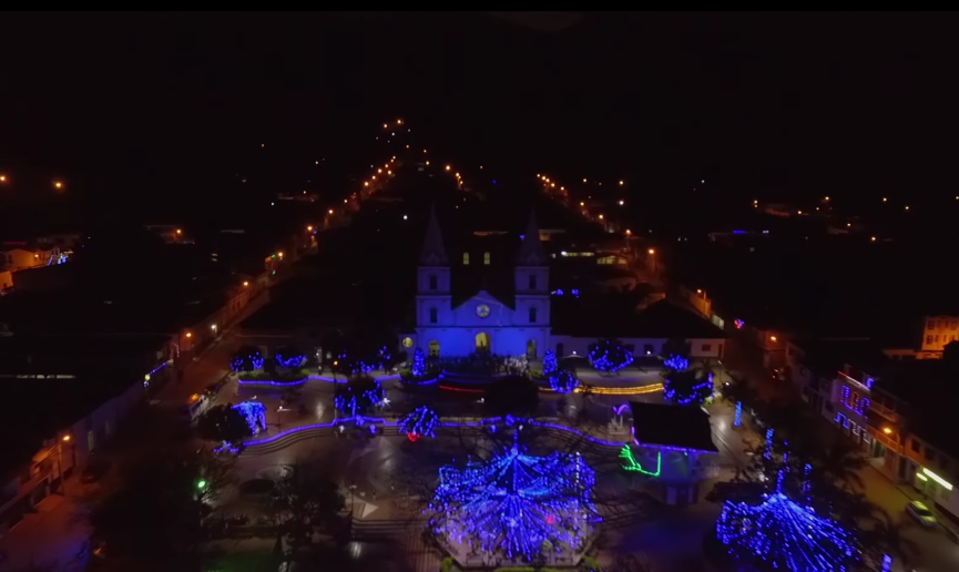 Parque Princpial Capitanejo Santander.Epoca Decembrina.